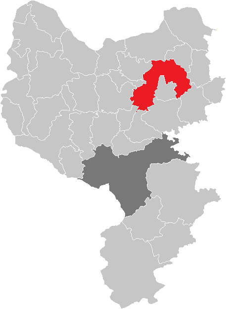 Bezirk Amstetten